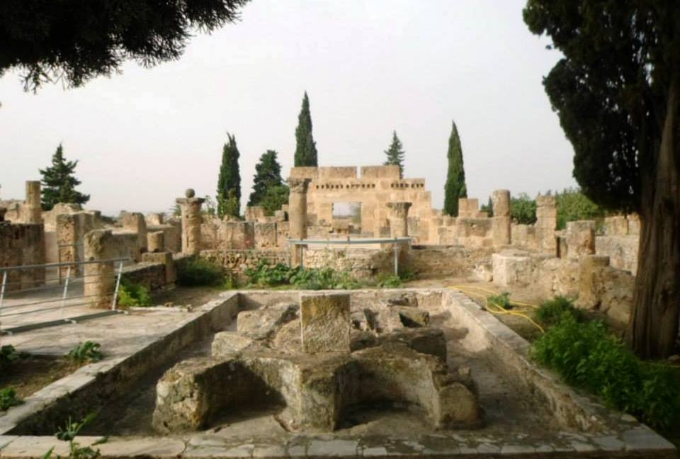 Vestiges d'habitations romaine, Utique